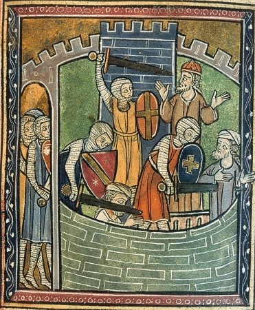 Prise dÄntiochie